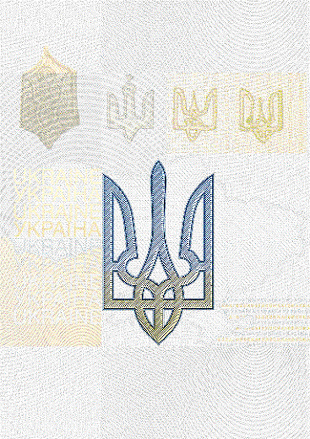 Зразок бланка паспорта громадянина України. зображення малого Державного Герба України та стилізованих зображень історичних, культурних та архітектурних пам’яток